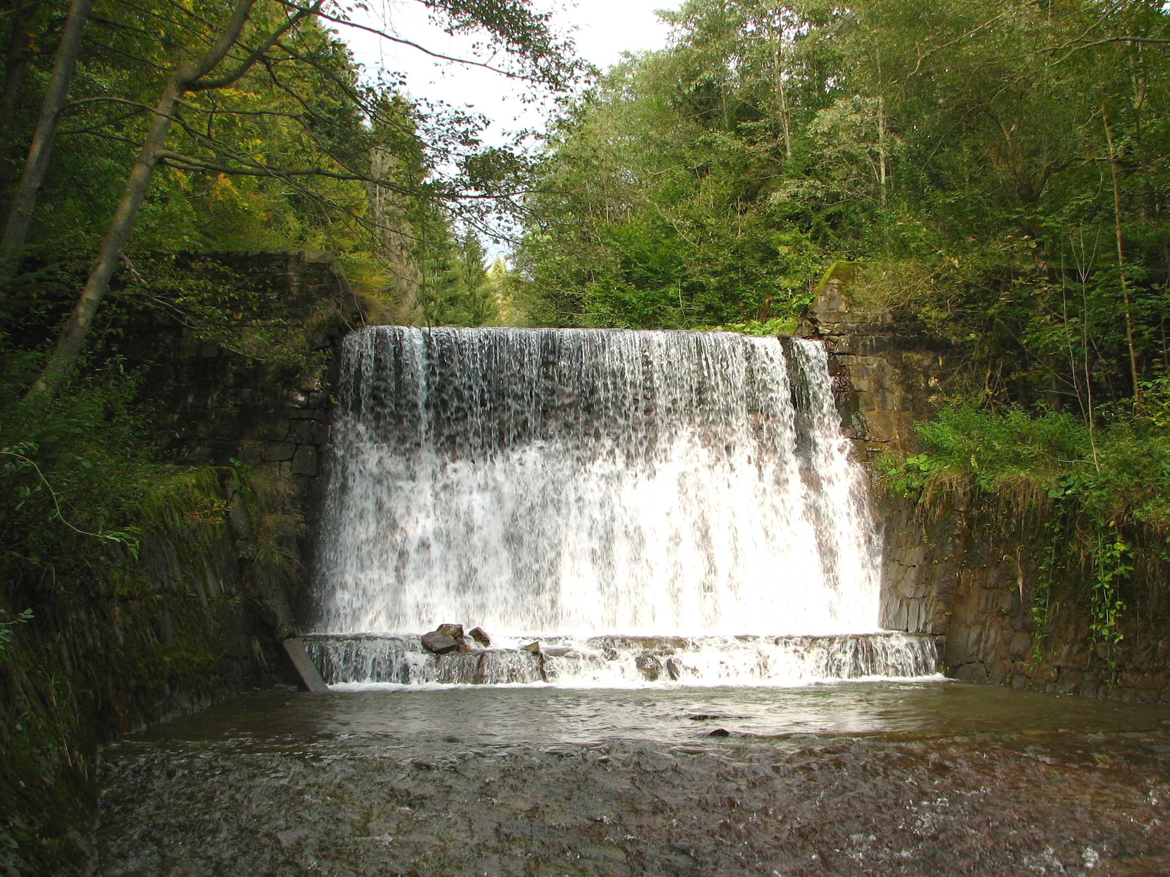 Murowana kaskada na potoku Bystra w Złatnej-Hucie.